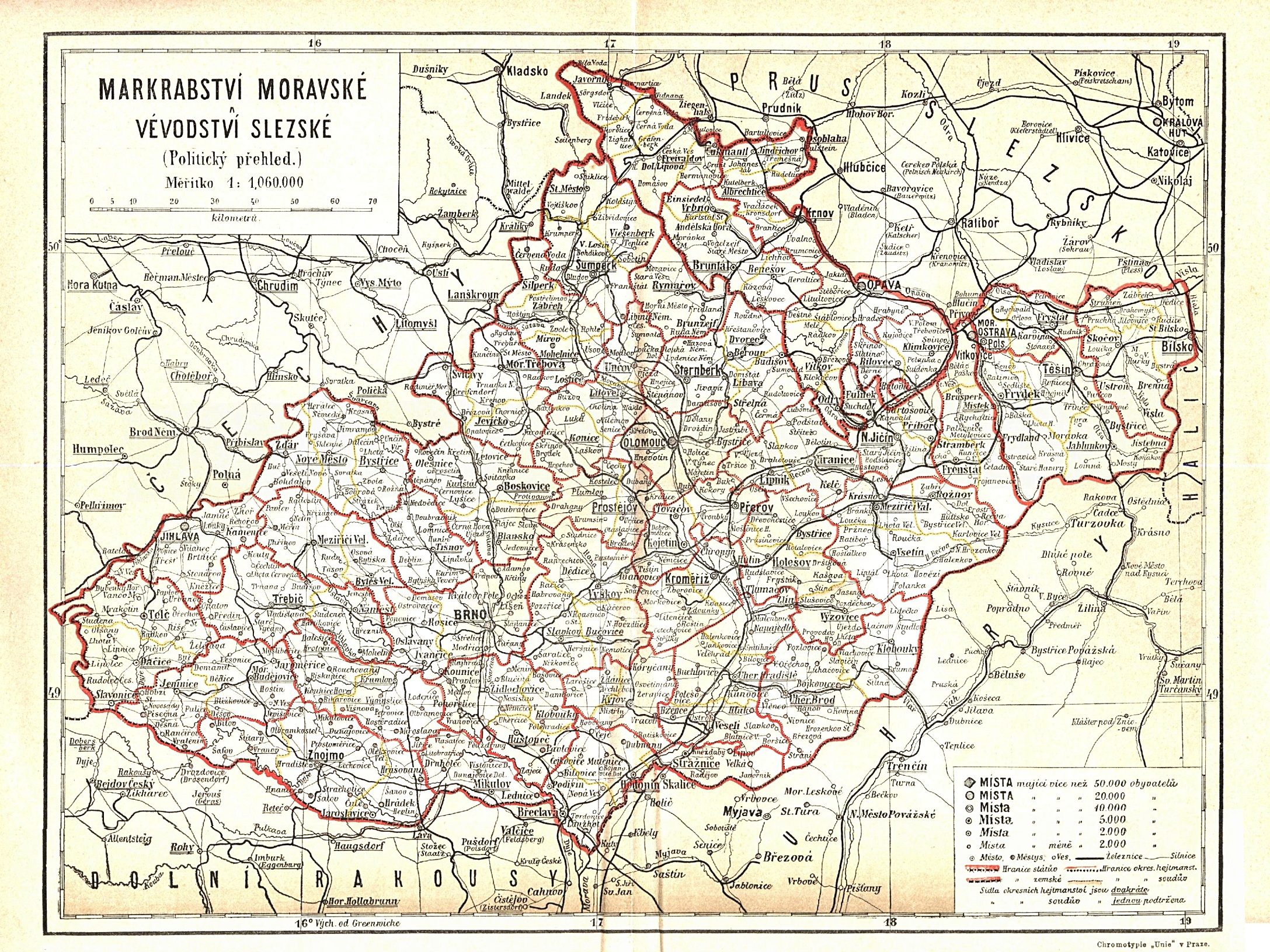 Správní rozdělení Markrabství moravského a Vévodství slezského mezi roky 1896 - 1900.